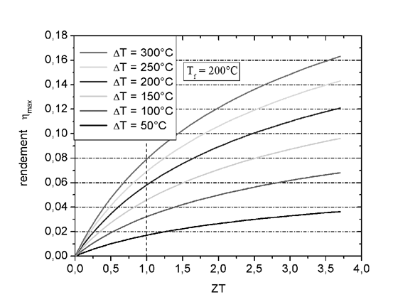 Ce graphique montre l'évolution du rendement de conversion d'un module thermoélectrique en fonction du facteur de mérite. graphique réalisé par Utilisateur:David Berardan Utilisateur:David Berardan